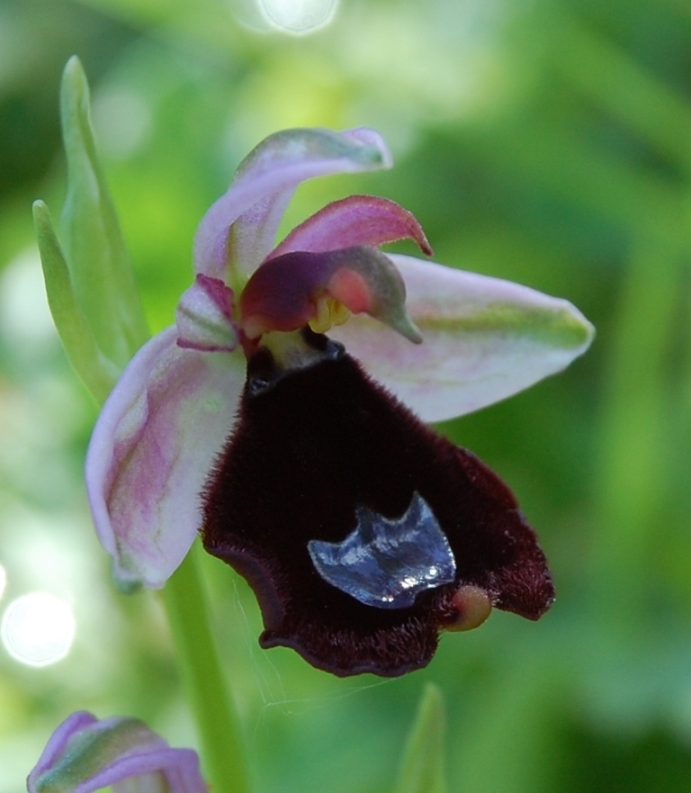 Ophrys bertolonii Bosco della Ficuzza, Sicily